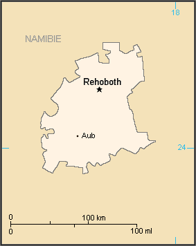 Description:Carte du Rehoboth Auteur:Rémih